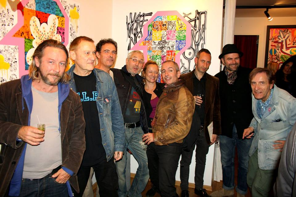 Vernissage Galerie Onega Paris, VLP